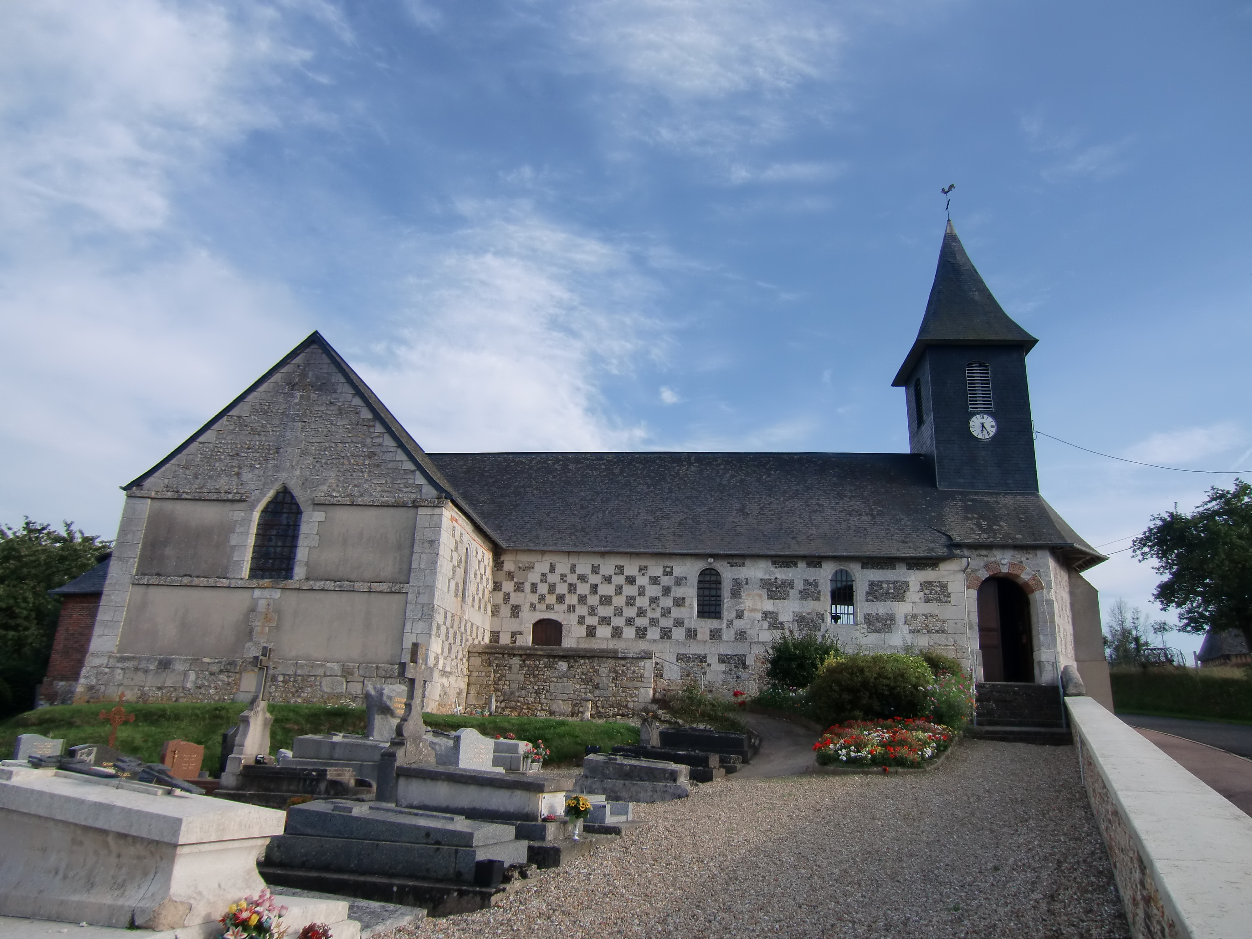 église de Saint-Christophe-sur-Condé (Eure, Normandie, France)